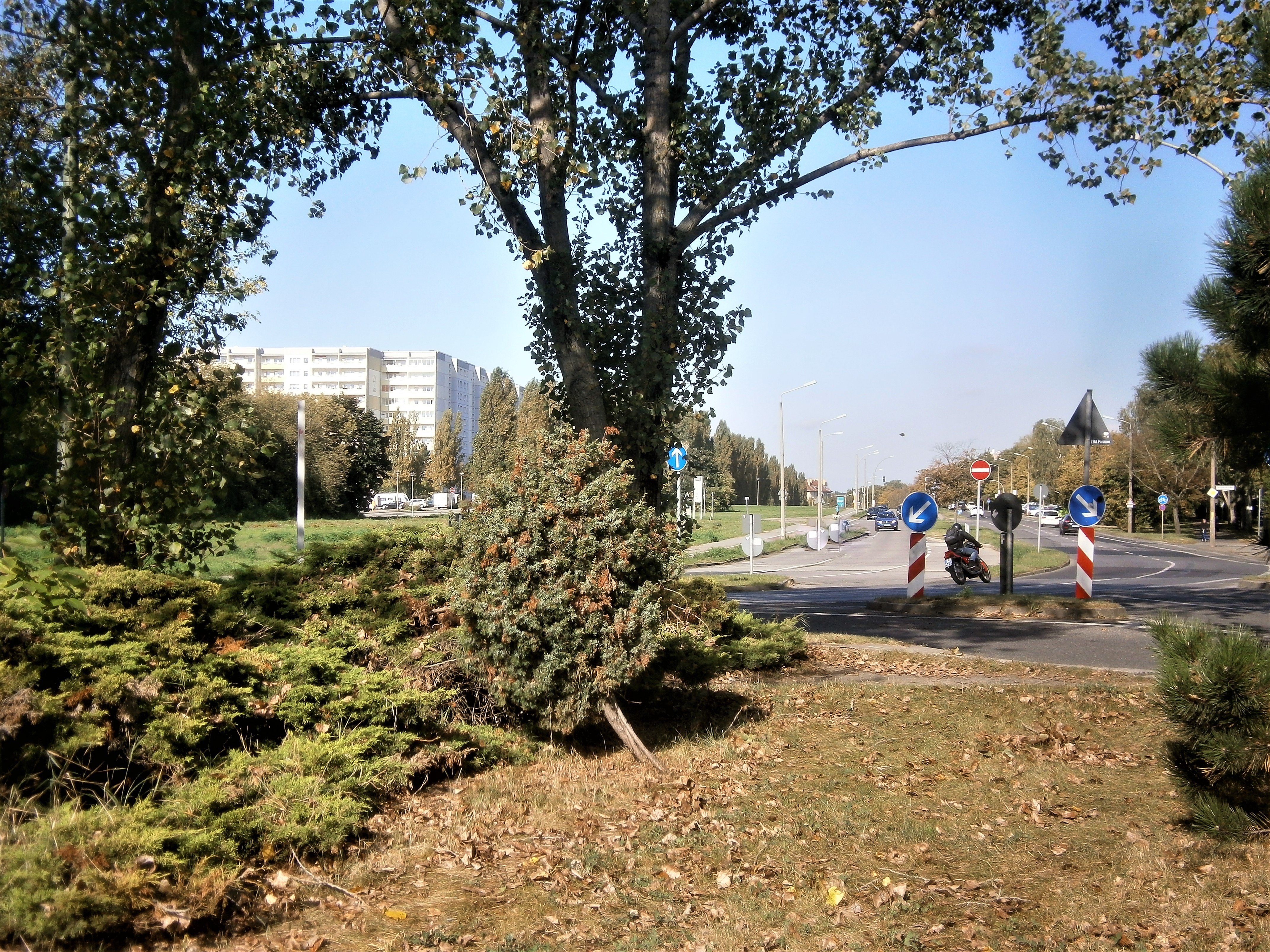 Die Kniprodestraße ist ein Verkehrszug im Berliner Bezirk Pankow, Ortsteil Prenzlauer Berg mit Grundstückszählung in Hufeisen. Bild: Nach West ab Kniprodestraße 59